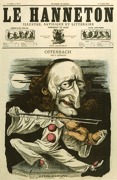 Le Hanneton n° 37 du 24 octobre 1867 : Jacques Offenbach (1819-1880), dessin de Philippe-Auguste Cattelain. Bernay.